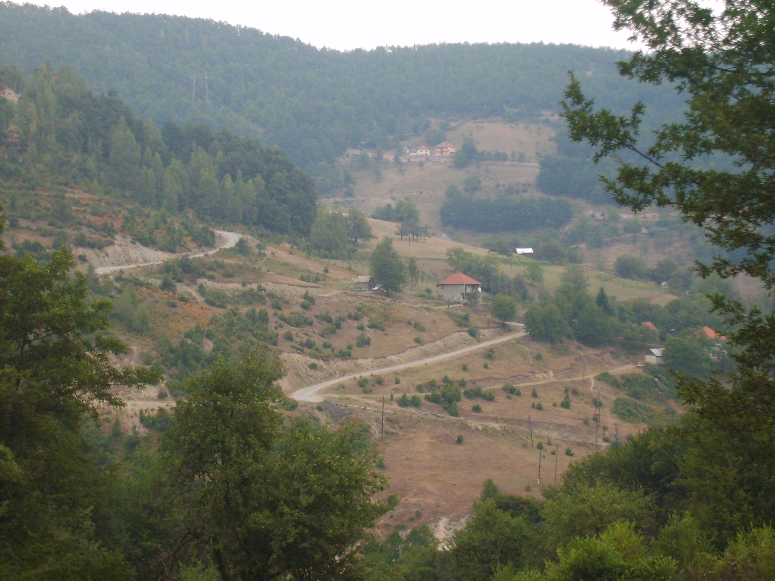 Autor fotografije, Veselin Nasufovic Selo Orahovica, Bijelo Polje